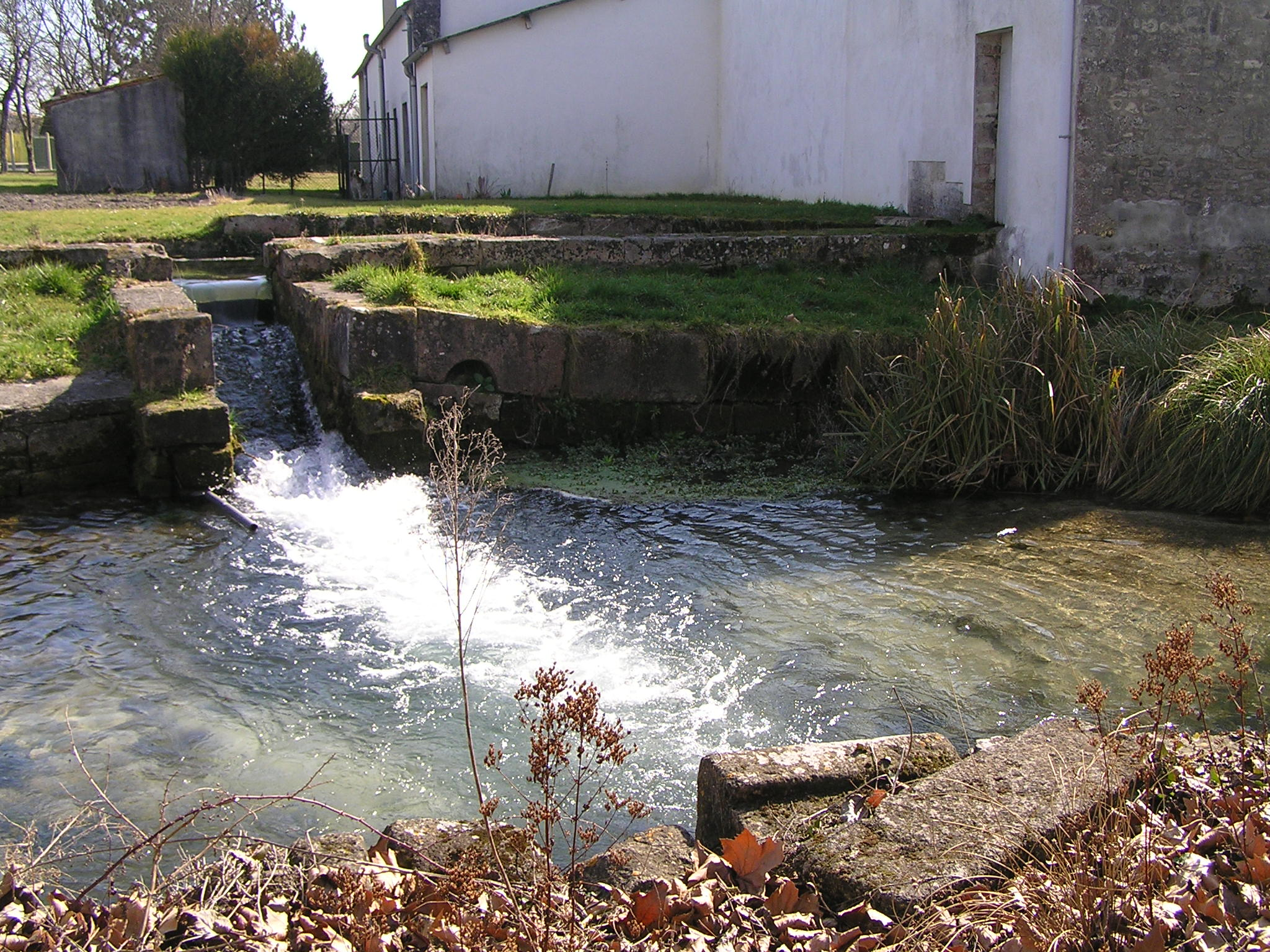 Moulin à Aujac sur l’Antenne.